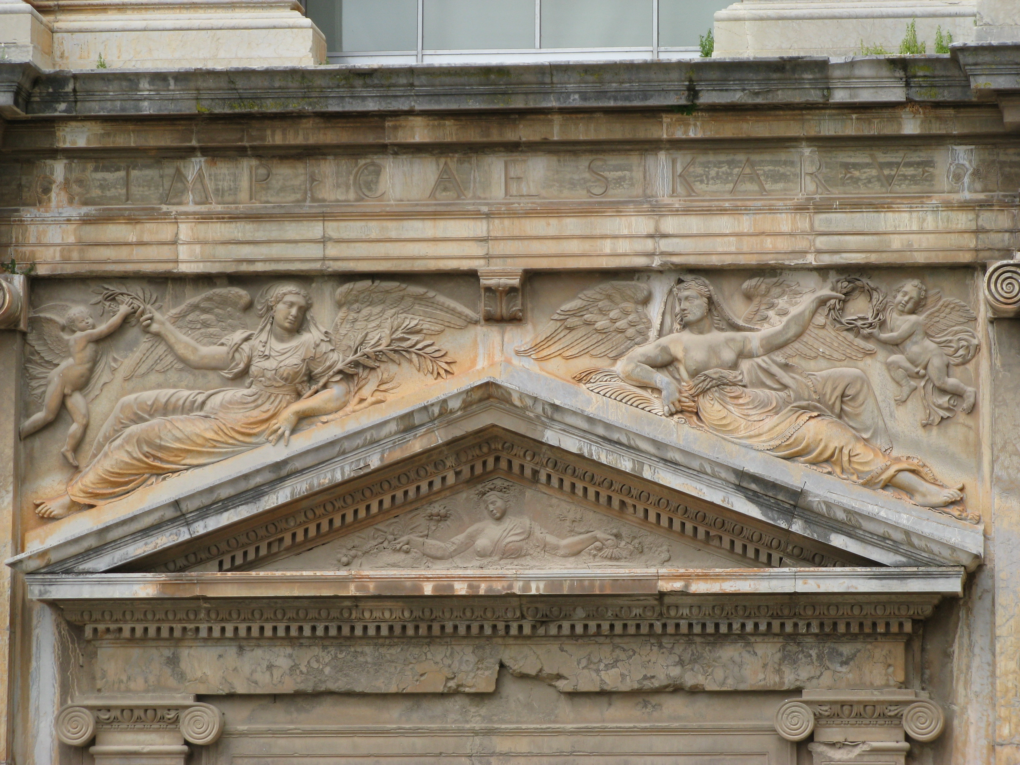 Palacio de Carlos V